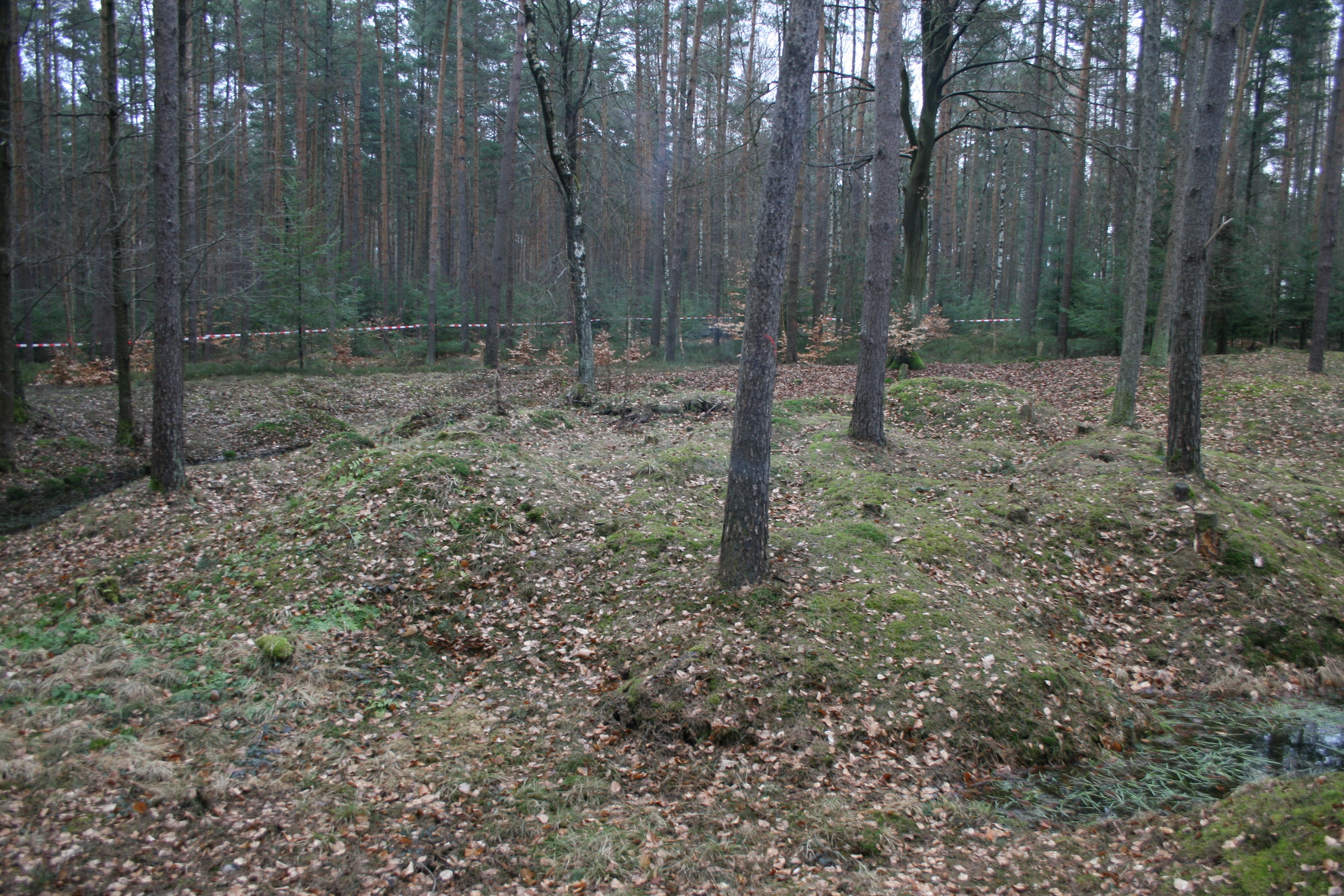 Holzturmstelle A des Wp 10/8 südlich von Kastell Lützelbach am Odenwaldlimes. Zustand 2010